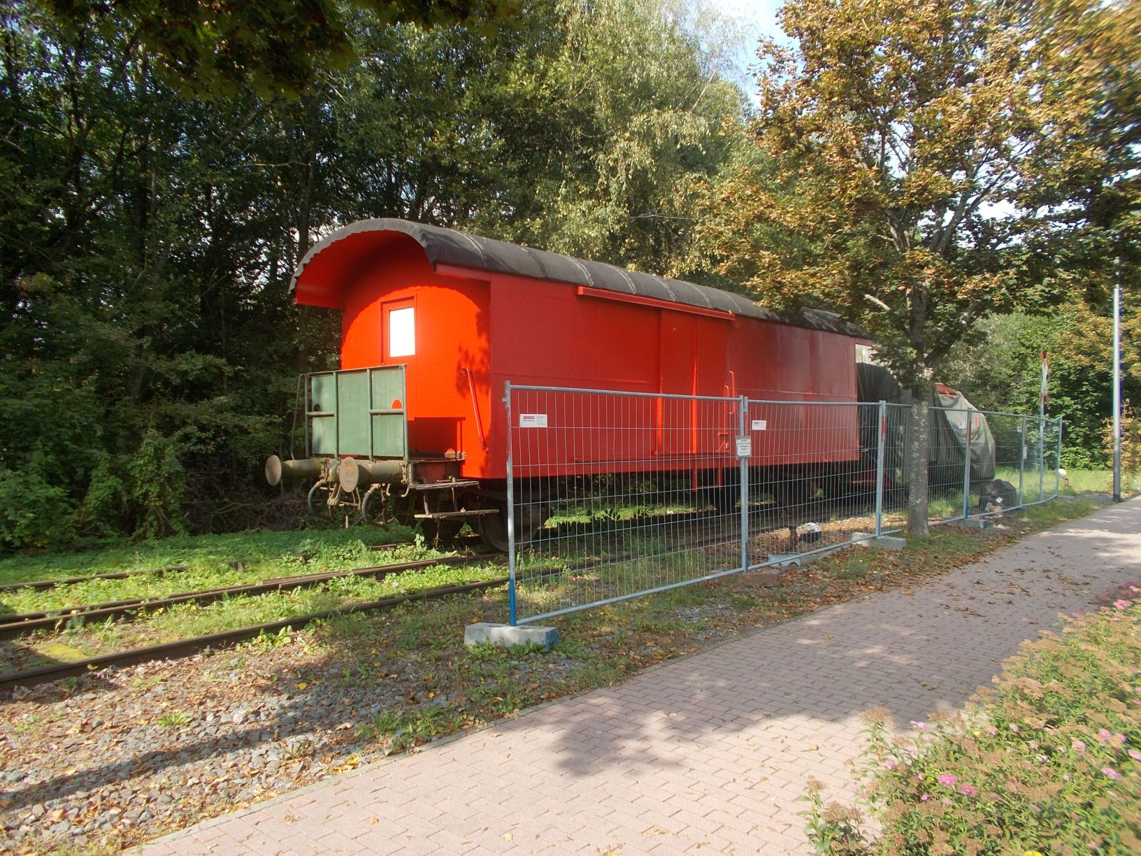 Lok vorm Birkenfelder Bahnhof: LKM FNr. 261546/1967, Typ V18B II, B-dh, 1435 mm, 24.08.1967 geliefert an VEB Getriebewerk Pritzwalk "V 18-01" (1969, 1974 vh) /1994 Eisenbahnfreunde Oberberg EFO, Eisenbahnmuseum Dieringhausen "V 18-01" (06.2000 vh) /2004 Hochwaldbahn e.V. HWB, Hermeskeil "V 18-01" (10.2006 vh, 08.2008 vh zum Verkauf über vdmt) /16.12.2011 Denkmal, ehem. Bf Birkenfeld, Birkenfeld/Nahe